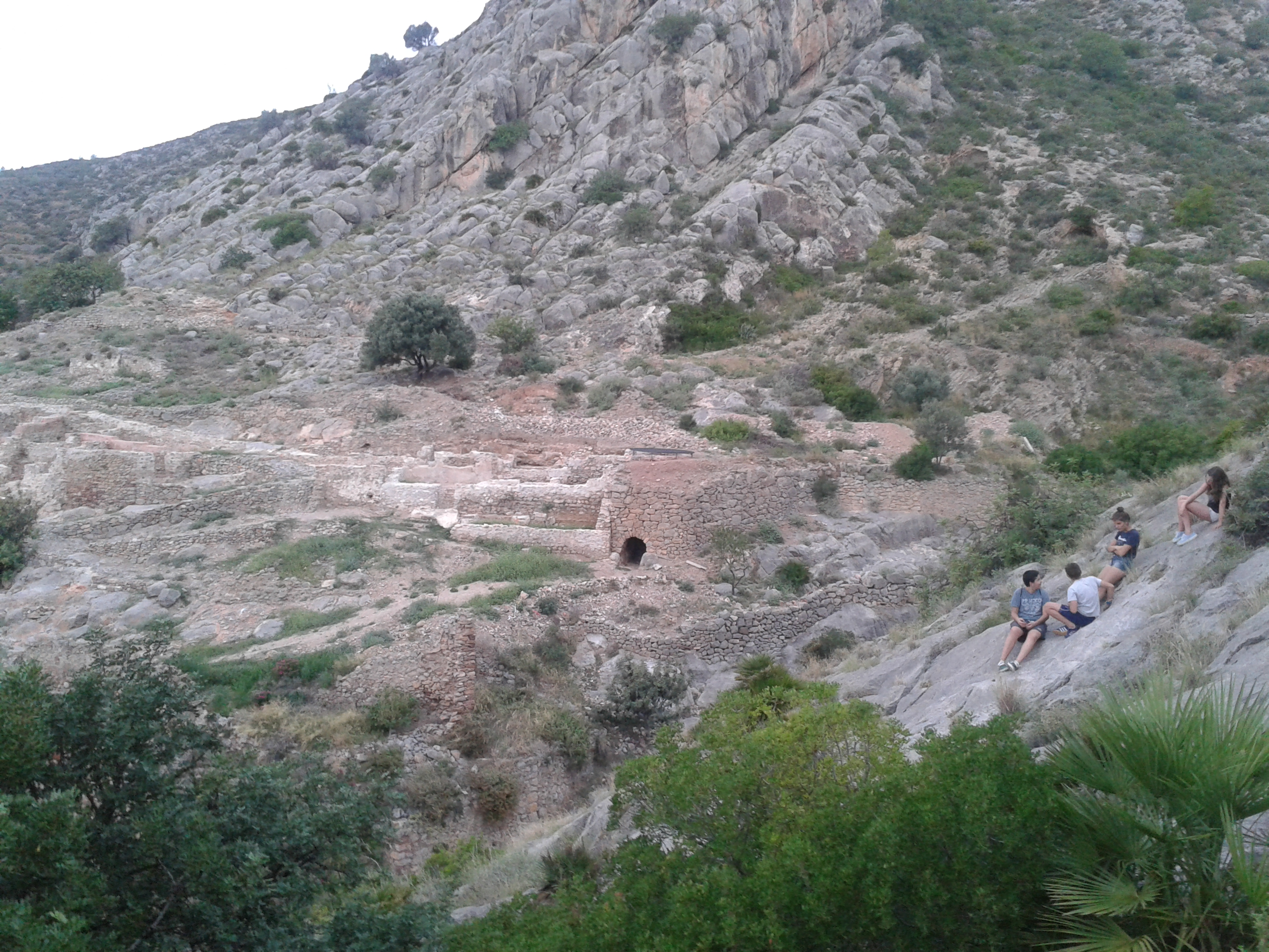 Morería de Borriol